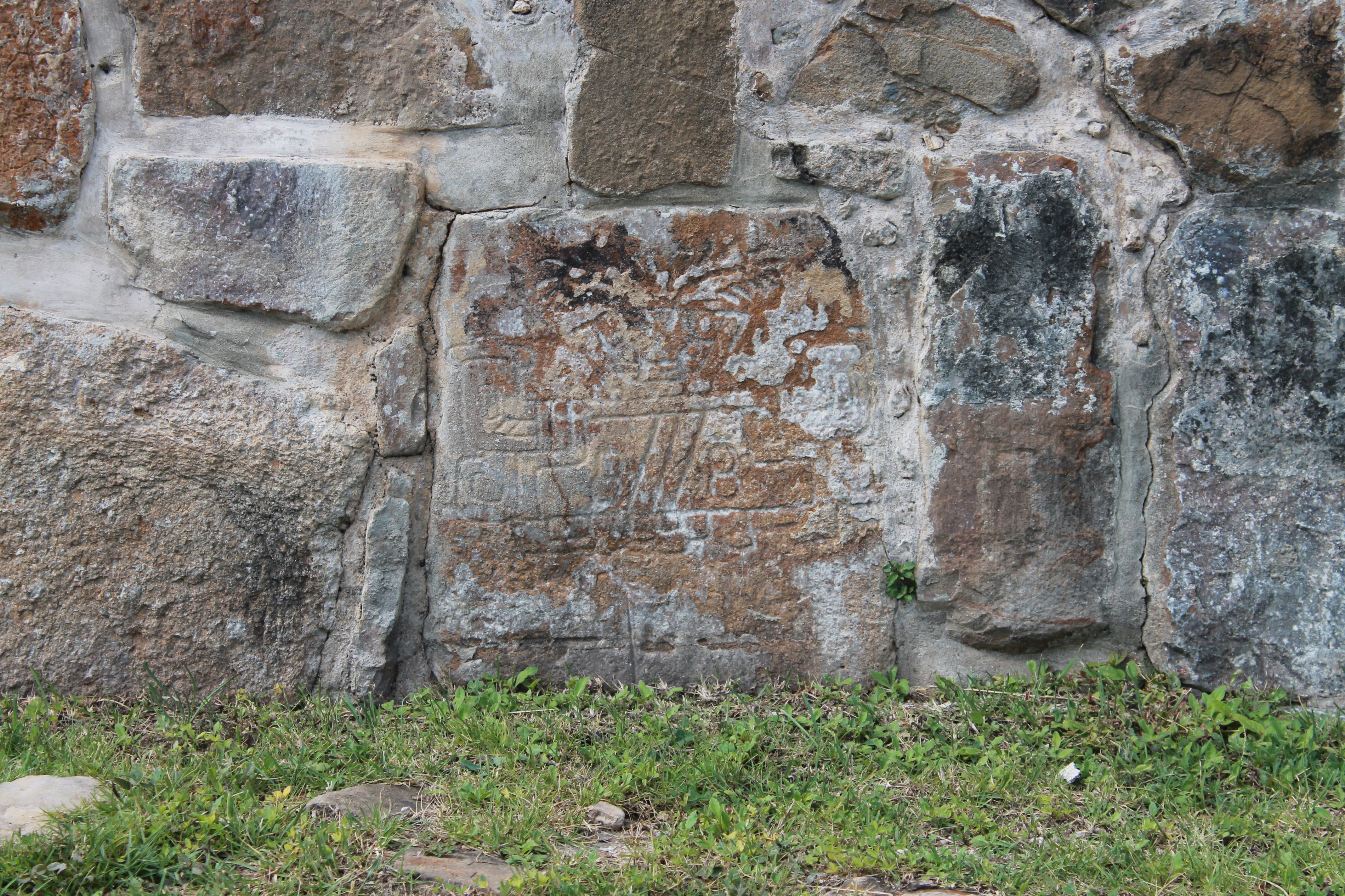 Se aprecia un relieve zapoteca realizado en una piedra ubicada en la base de un muro del Edificio J u Observatorio. Esta lápida grabada se denomina "Lápida de conquista"; muestra un glifo del lugar (Monte Albán) y debajo una cabeza invertida. Ha sido interpretado como una representación de los vencidos.